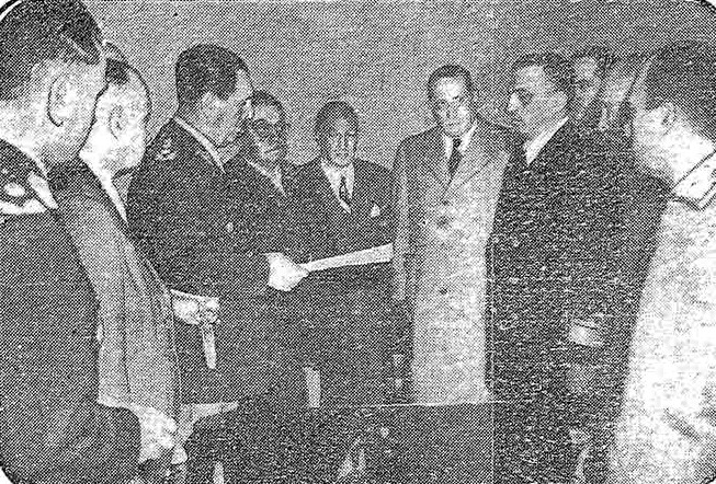 Jura Luis J. Cornés como ministro de marina